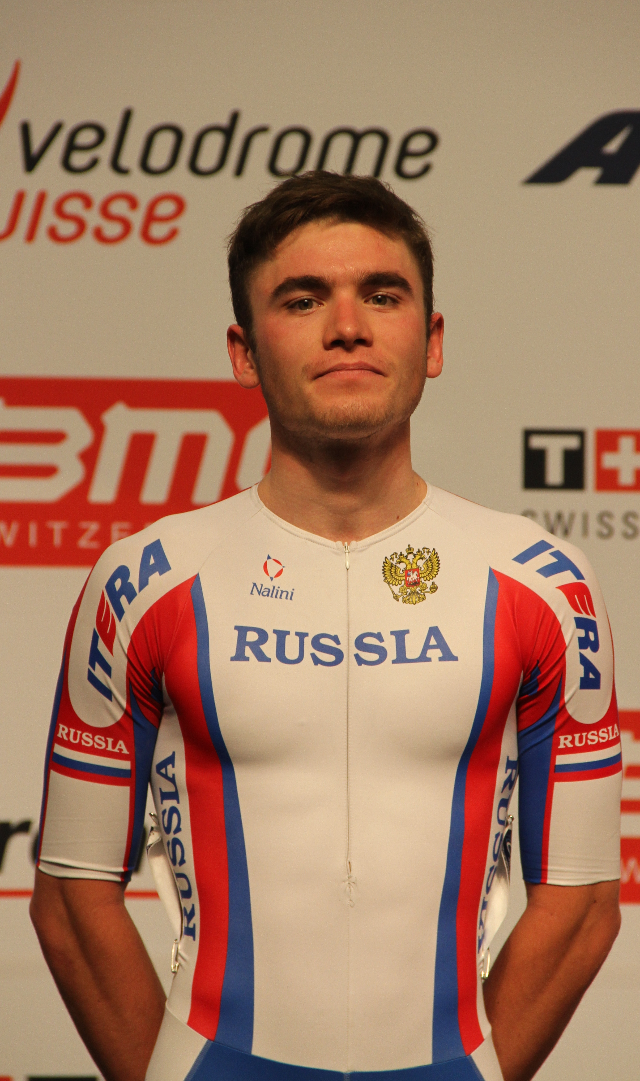 Andrey Sazanov, russ. Radsportler The making of this document was supported by the Community-Budget of Wikimedia Germany.